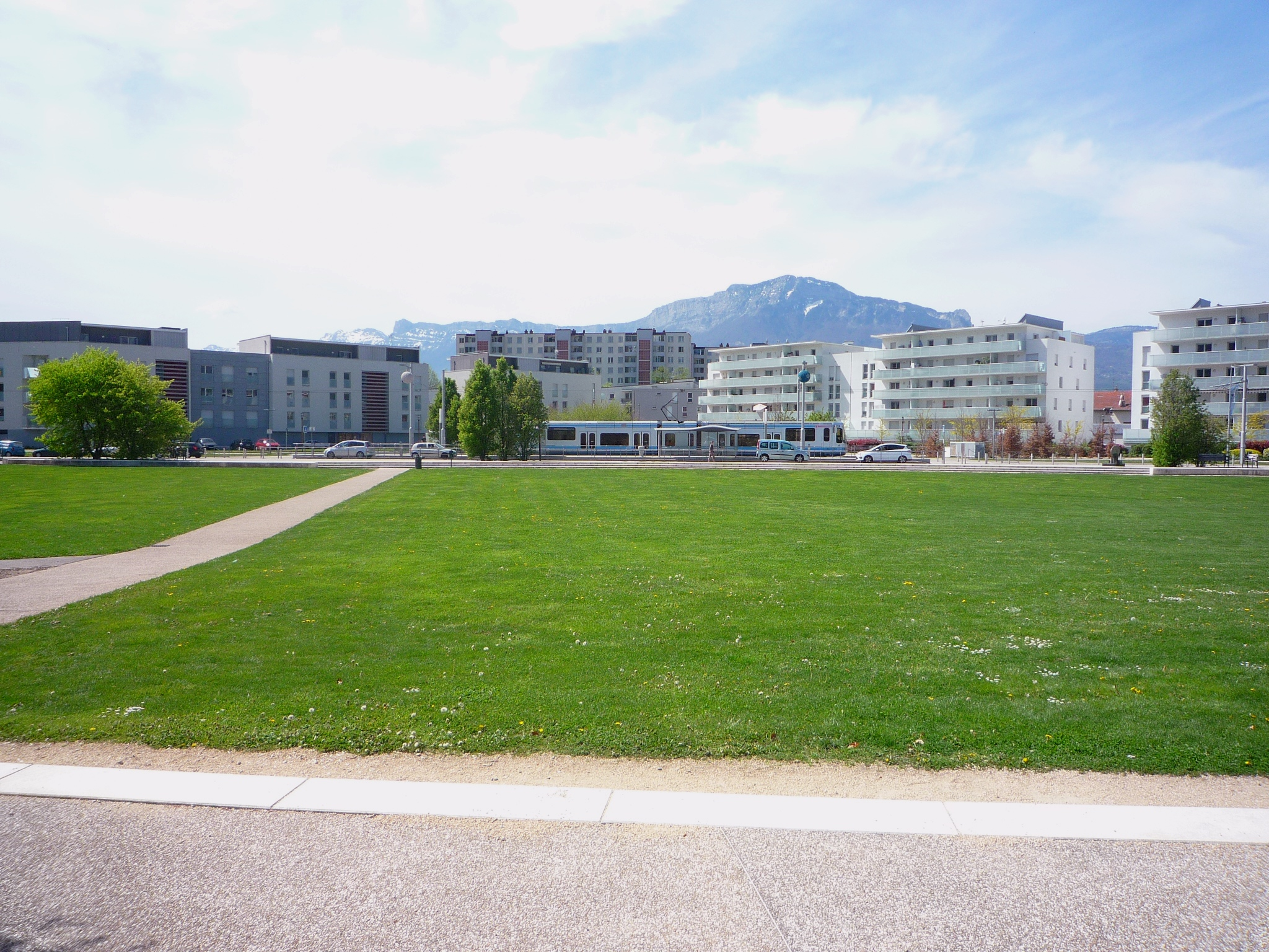 Tramway ligne D dans le parc Jo-Blanchon - Saint-Martin-d'Hères.